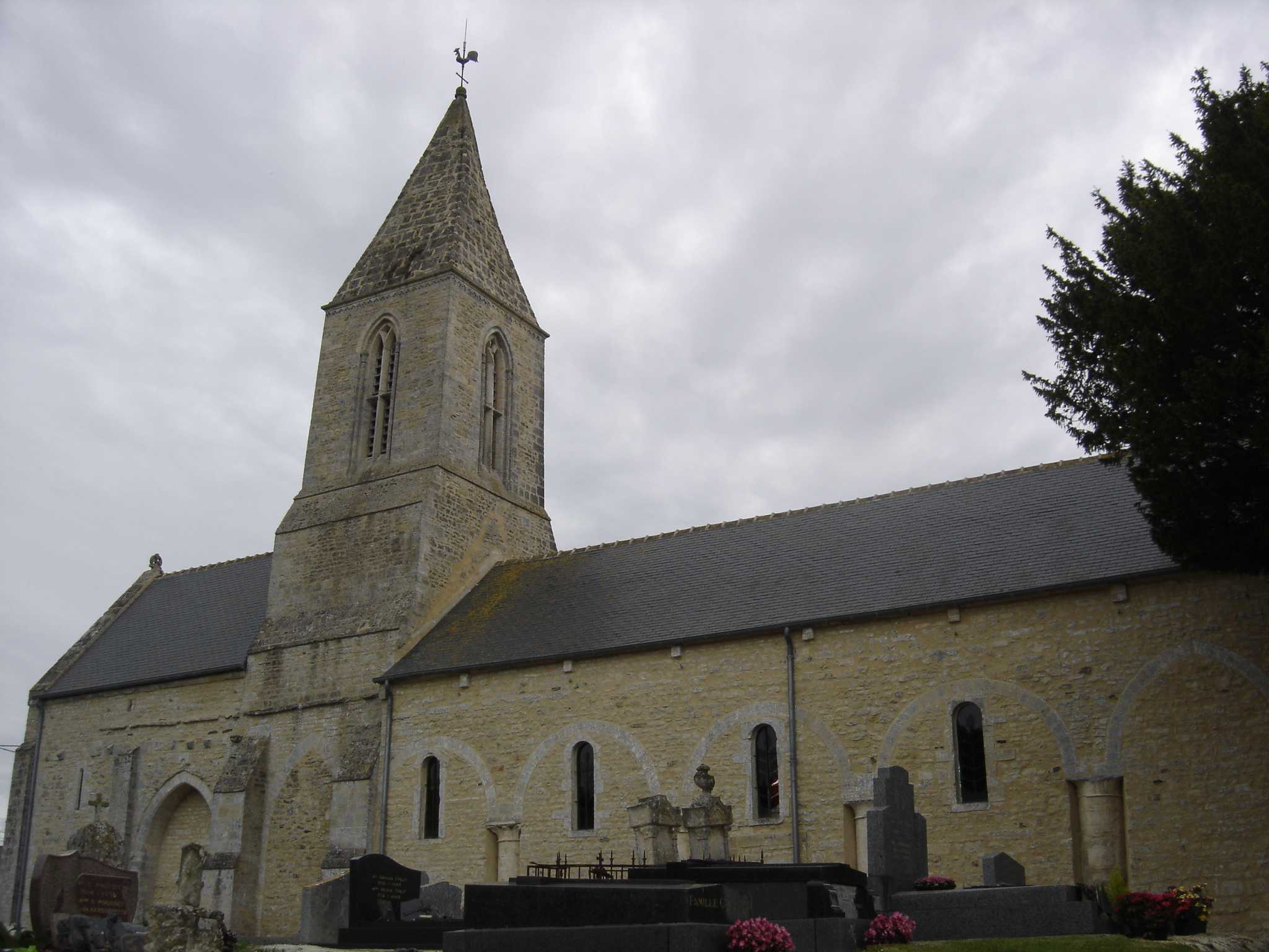 Église Saint-Rémi, (Inscrit, 1926) église Saint-Rémy, à gauche le choeur à chevet plat conserve ses modillons. La pyramide du clocher en pierre est soulignée d'une frise de quadrilobes.A droite la nef (XIVè siècle)montre les restes d'arcades d'un bas-côté disparu. .